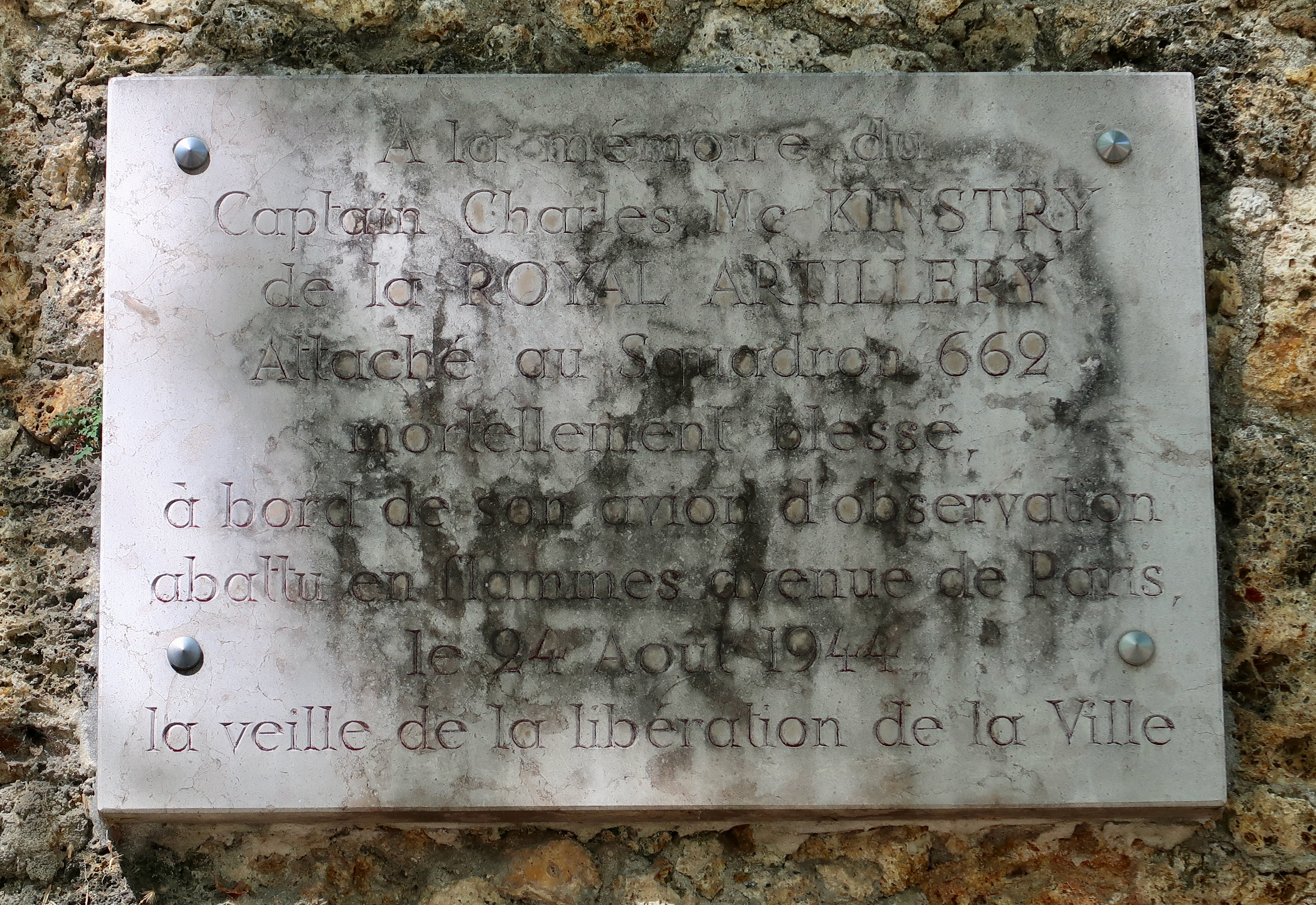 Plaque sur la façade du lycée La Bruyère, 31 avenue de Paris à Versailles (Yvelines), en hommage au capitaine Charles McKinstry, mortellement blessé à bord de son avion abattu en 1944, pendant la Libération de Paris.